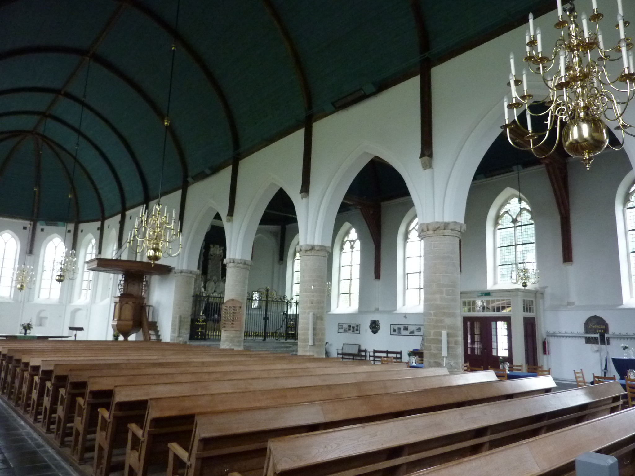 Zicht op een deel van het interieur van de Sint Adriaanskerk in Dreischor